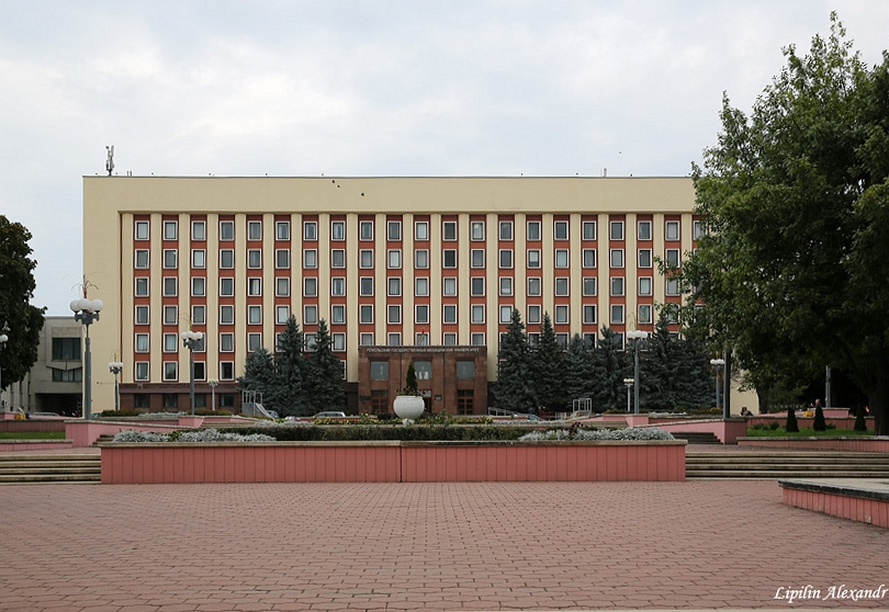 Гомель. Медыцынскі ўніверсітэт